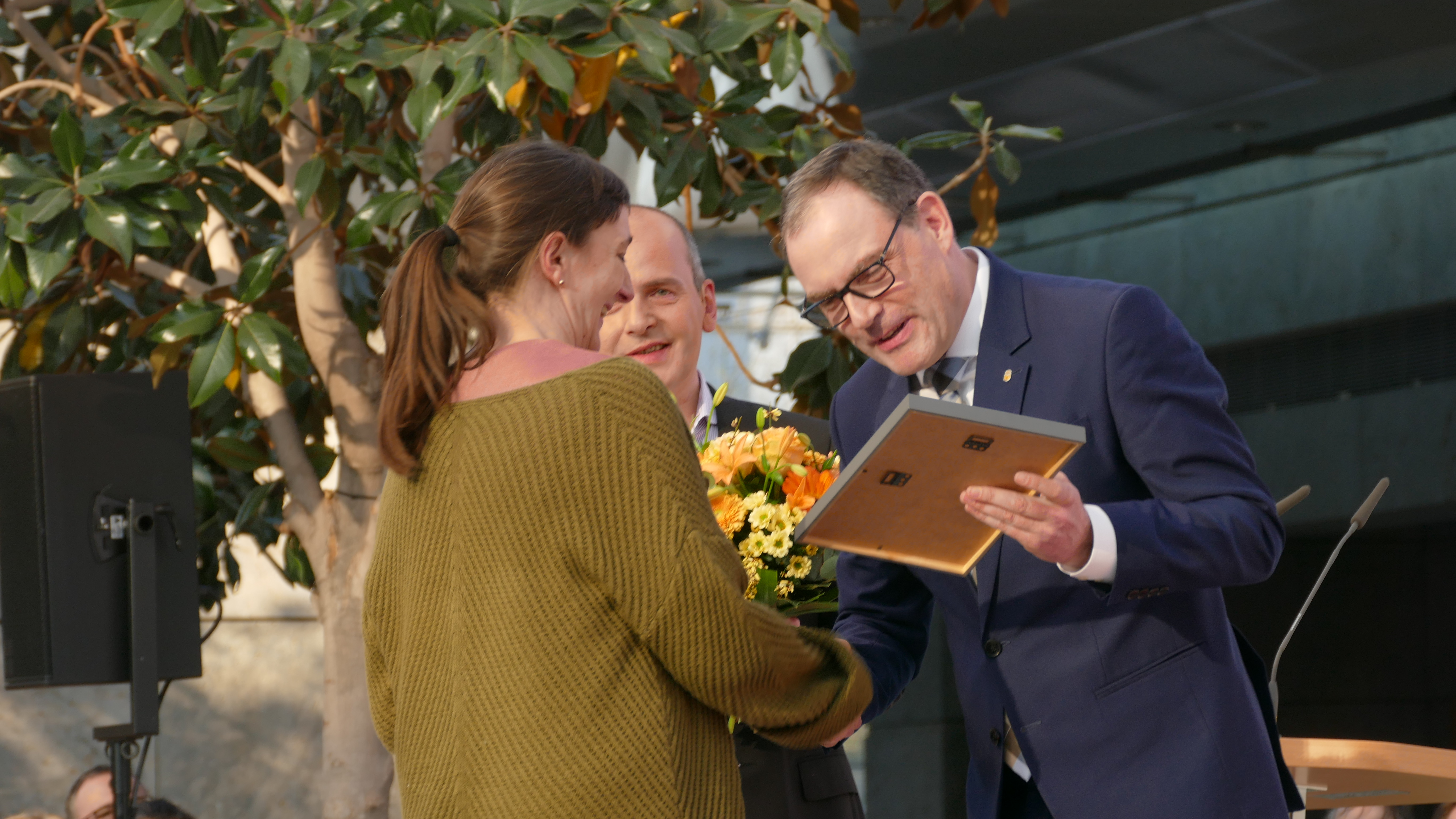 Eva Ruth Wemme erhält den Preis der Leipziger Buchpreis (Kategorie: Übersetzung) aus den Händen von Martin Buhl-Wagner (Geschäftsführer Leipziger Messe GmbH) für die Übersetzung aus dem Rumänischen von "Verlorener Morgen", ein Roman von Gabriela Adameșteanu